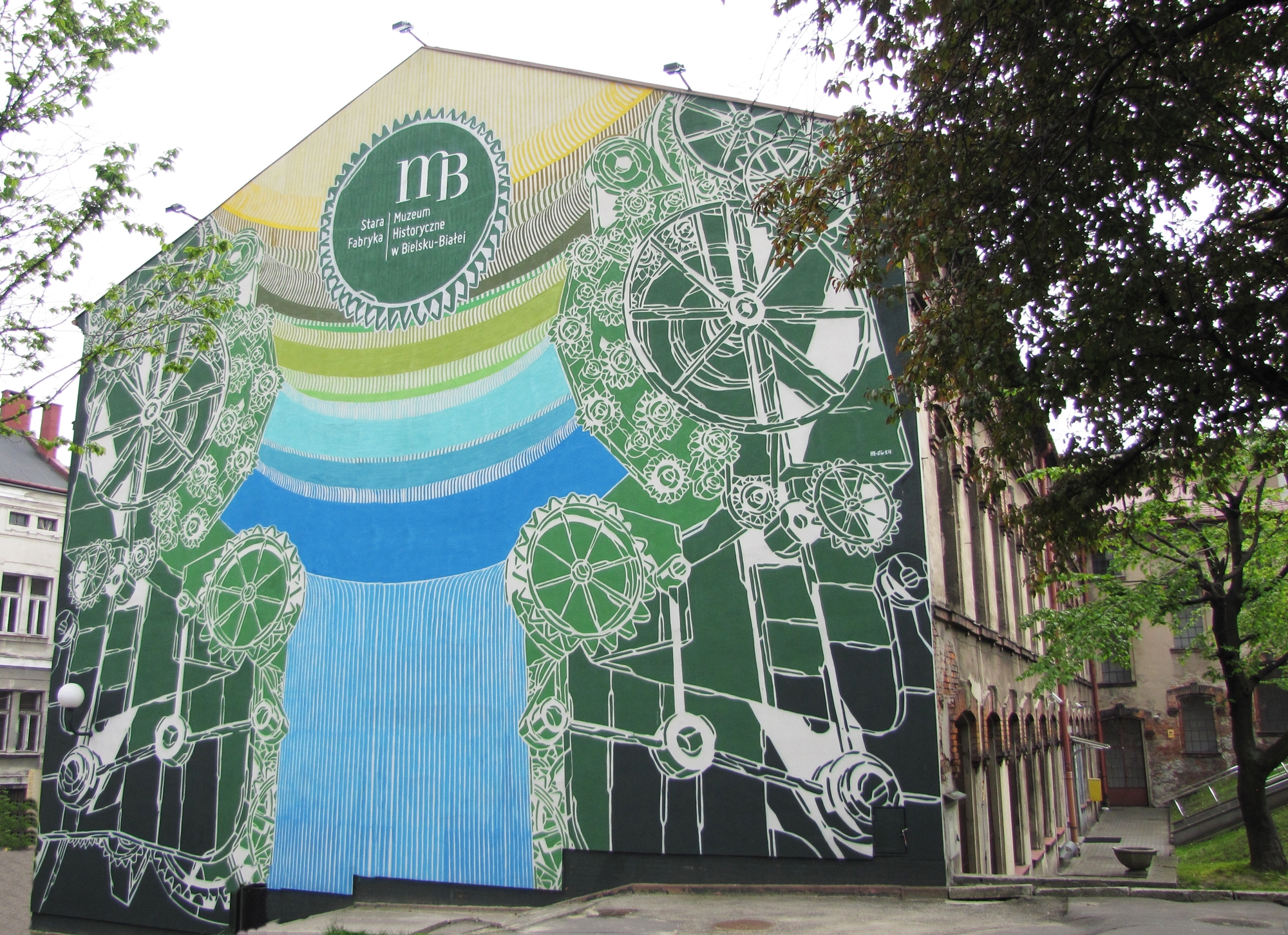 Stara Fabryka Muzeum w Bielsku-Białej, mural Mariusza Warasa